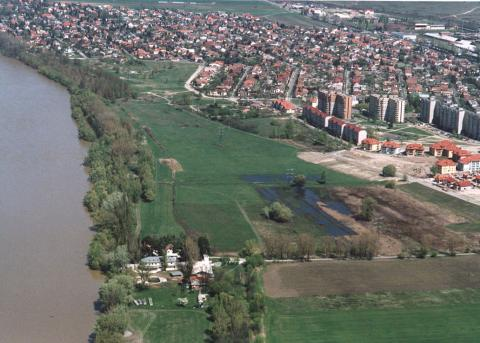 Dunakeszi, Hungary, aerialphotography